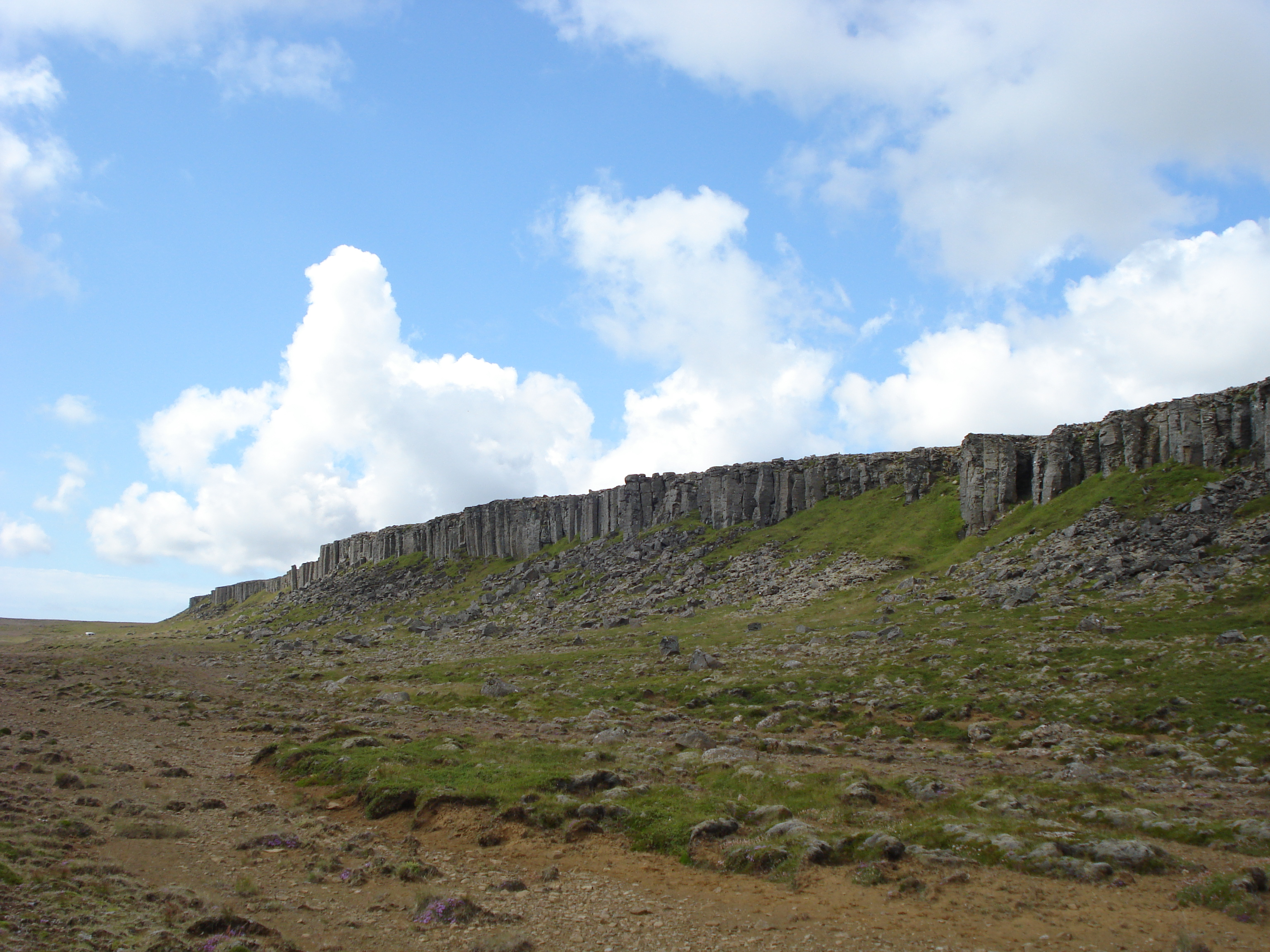 Gerðuberg á Snæfellsnesi, Iceland